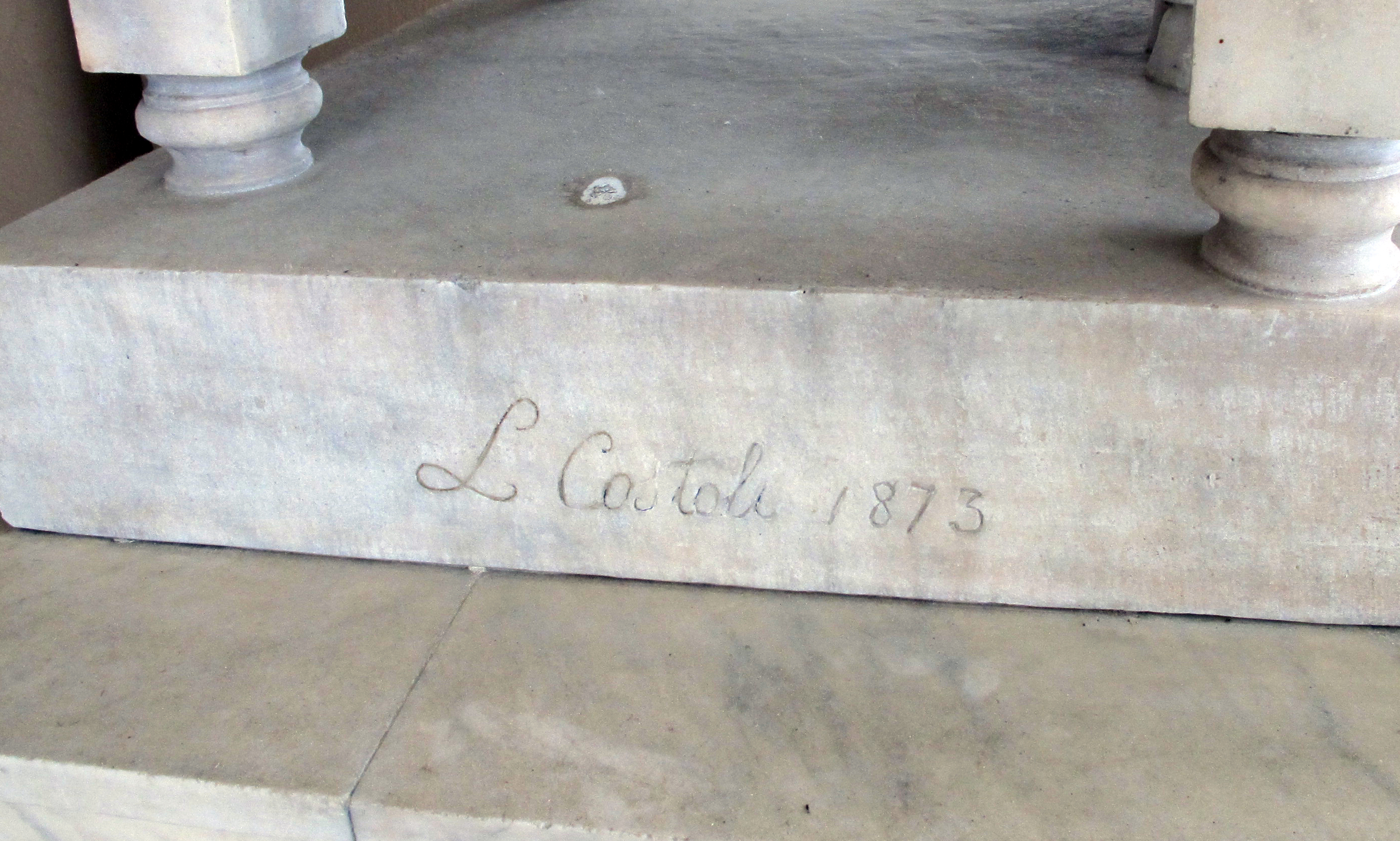 Santa Maria Nuova, Firenze